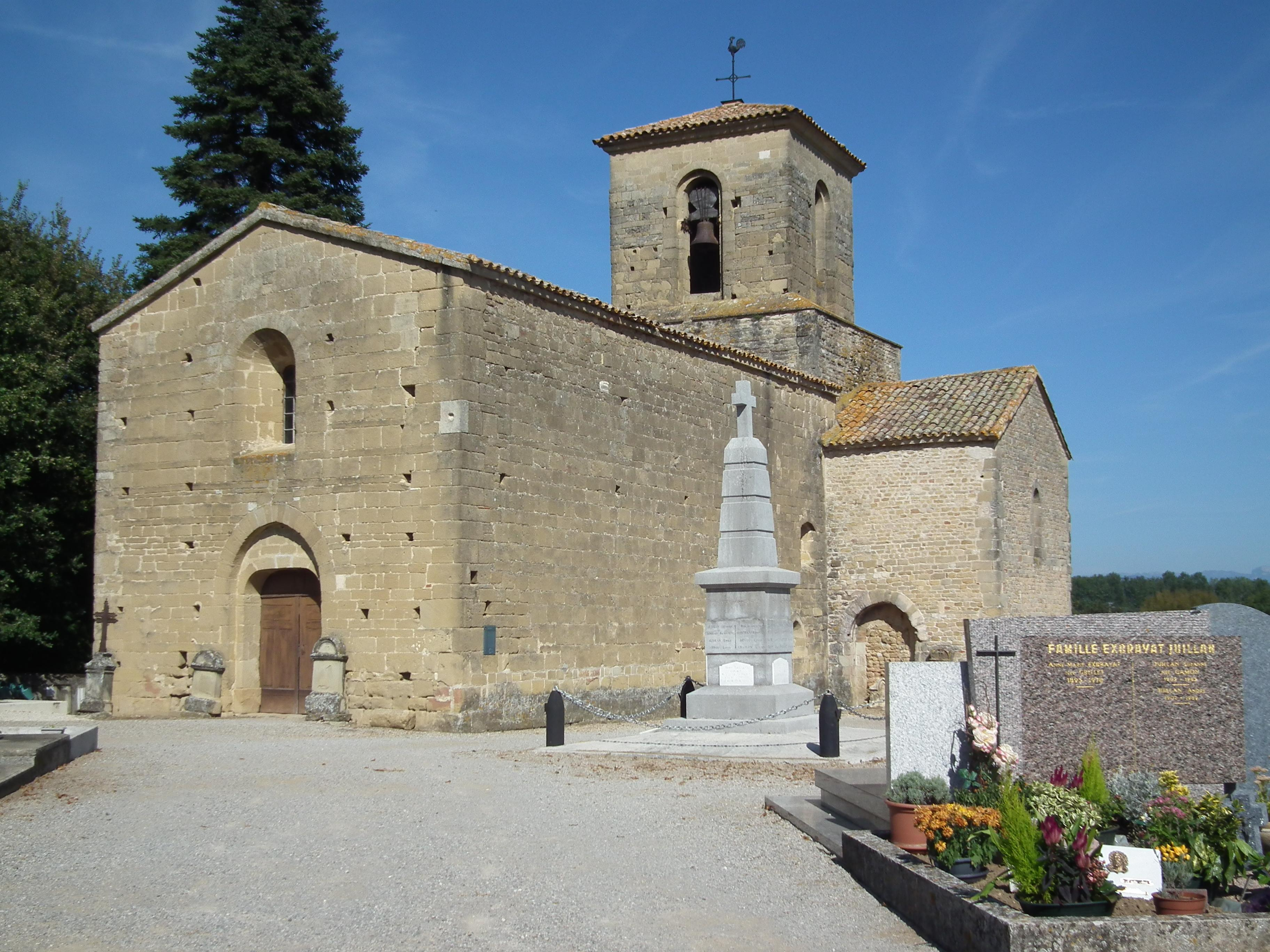 église Saint-Pierre à Chabrillan - Drôme - France .